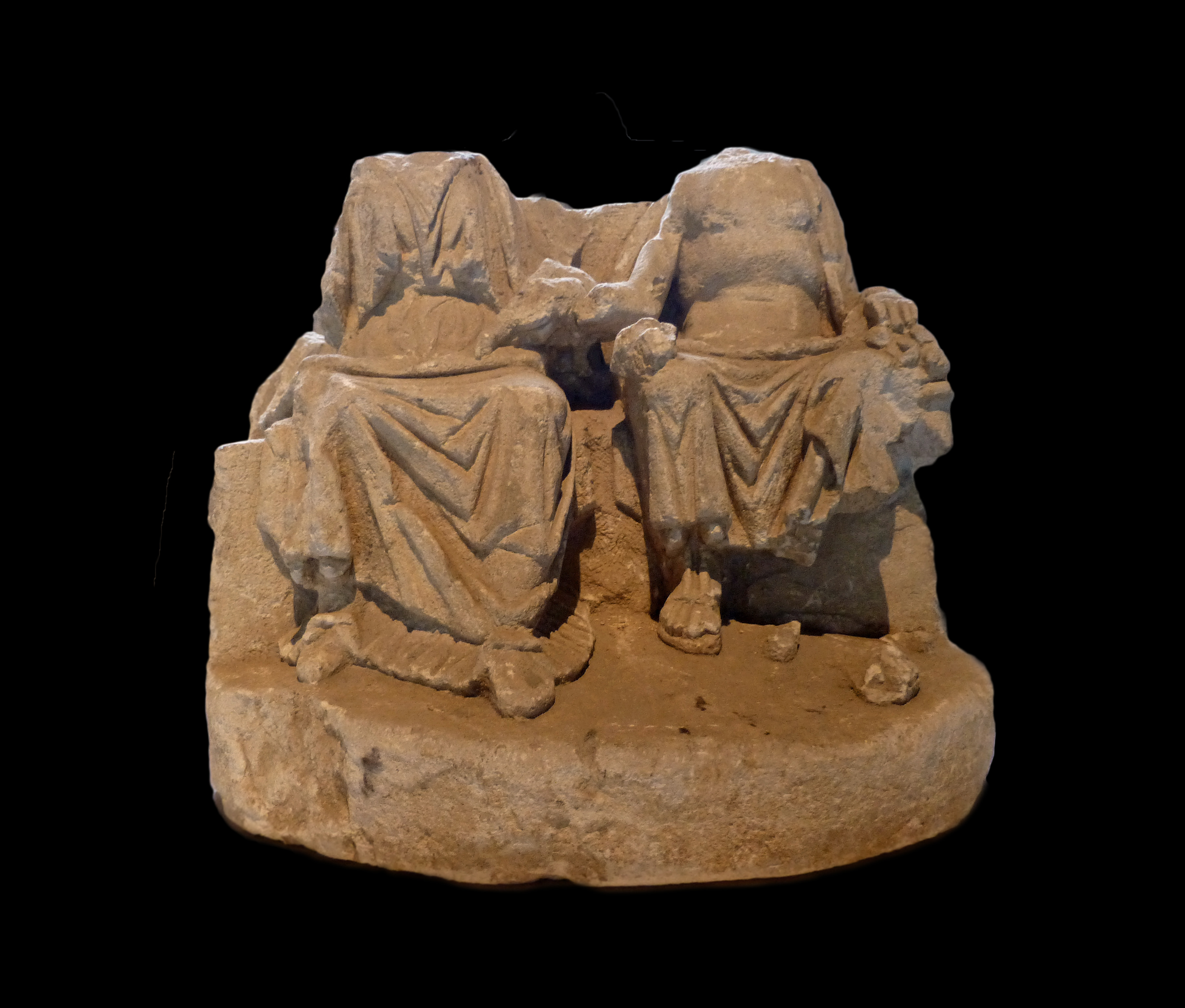 Abbaye Saint-Germain d'Auxerre : couple éduen, dieu et déesse sur un banc au dossier entouré de rosaces. Calcaire. Provenance : Auxerre (Saint-Julien). Inventaire : ESP 2878